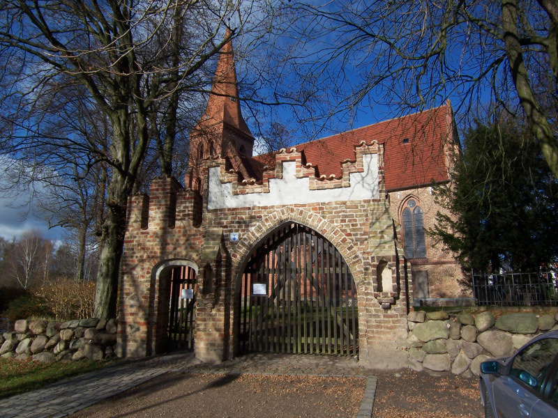 Kirche in Toitenwinkel, Rostock, Mecklenburg-Vorpommern